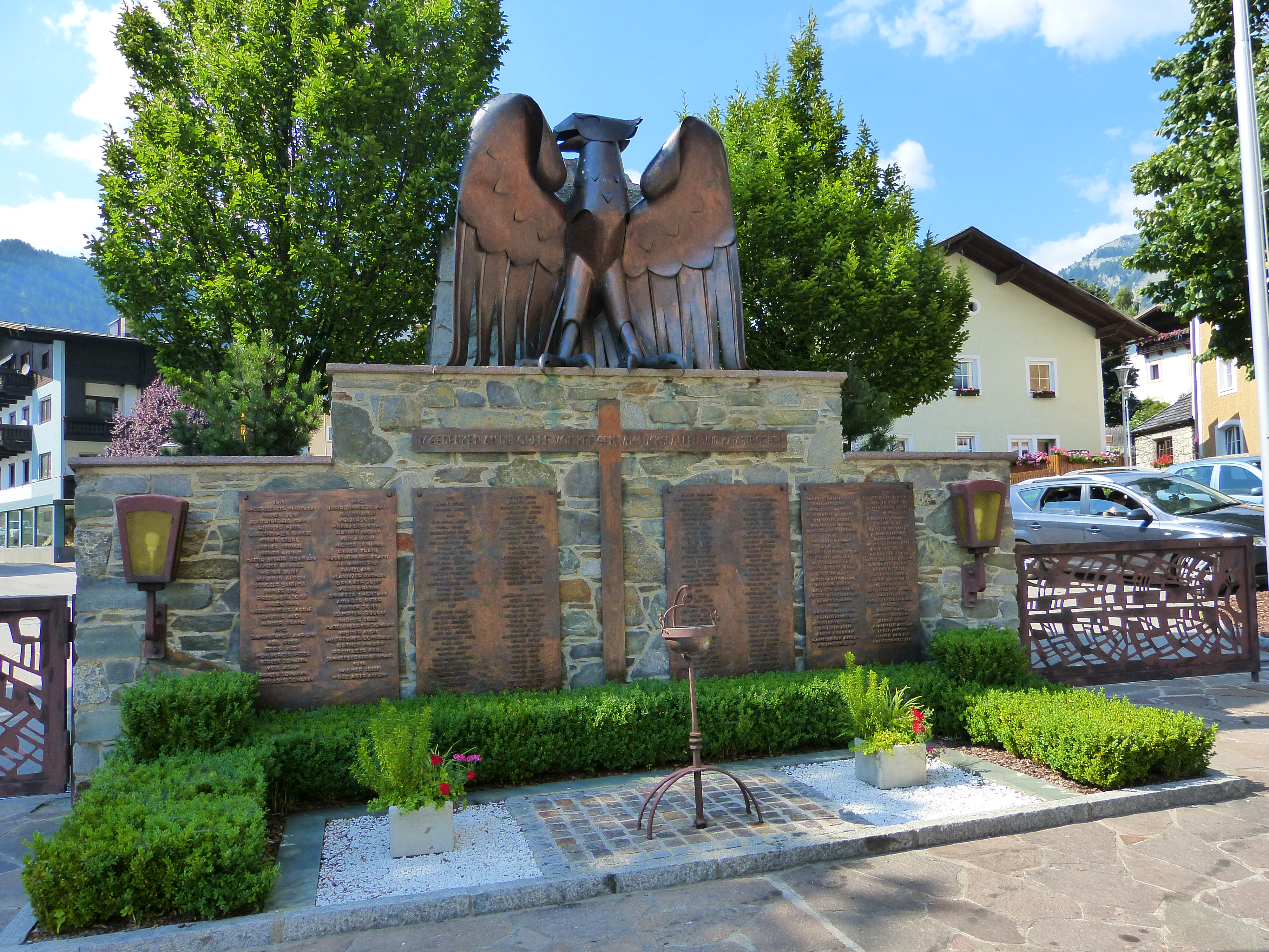 Kriegerdenkmal in Matrei in Osttirol, Bezirk Lienz, Tirol, Österreich This media shows the remarkable cultural object in the Austrian state of Tyrol listed by the Tyrolean Art Cadastre with the ID 104012. (on tirisMaps, pdf, more images on Commons, Wikidata) The making of this work was supported by Wikimedia Austria. For other files made with the support of Wikimedia Austria, please see the category Supported by Wikimedia Österreich.